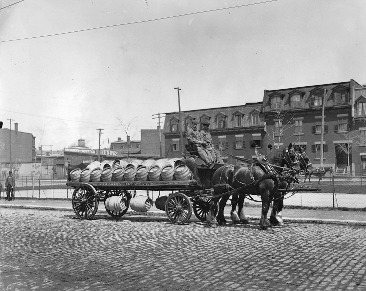 Chariot à bière de la Brasserie Molson, Montréal, Québec, Canada, vers 1908.